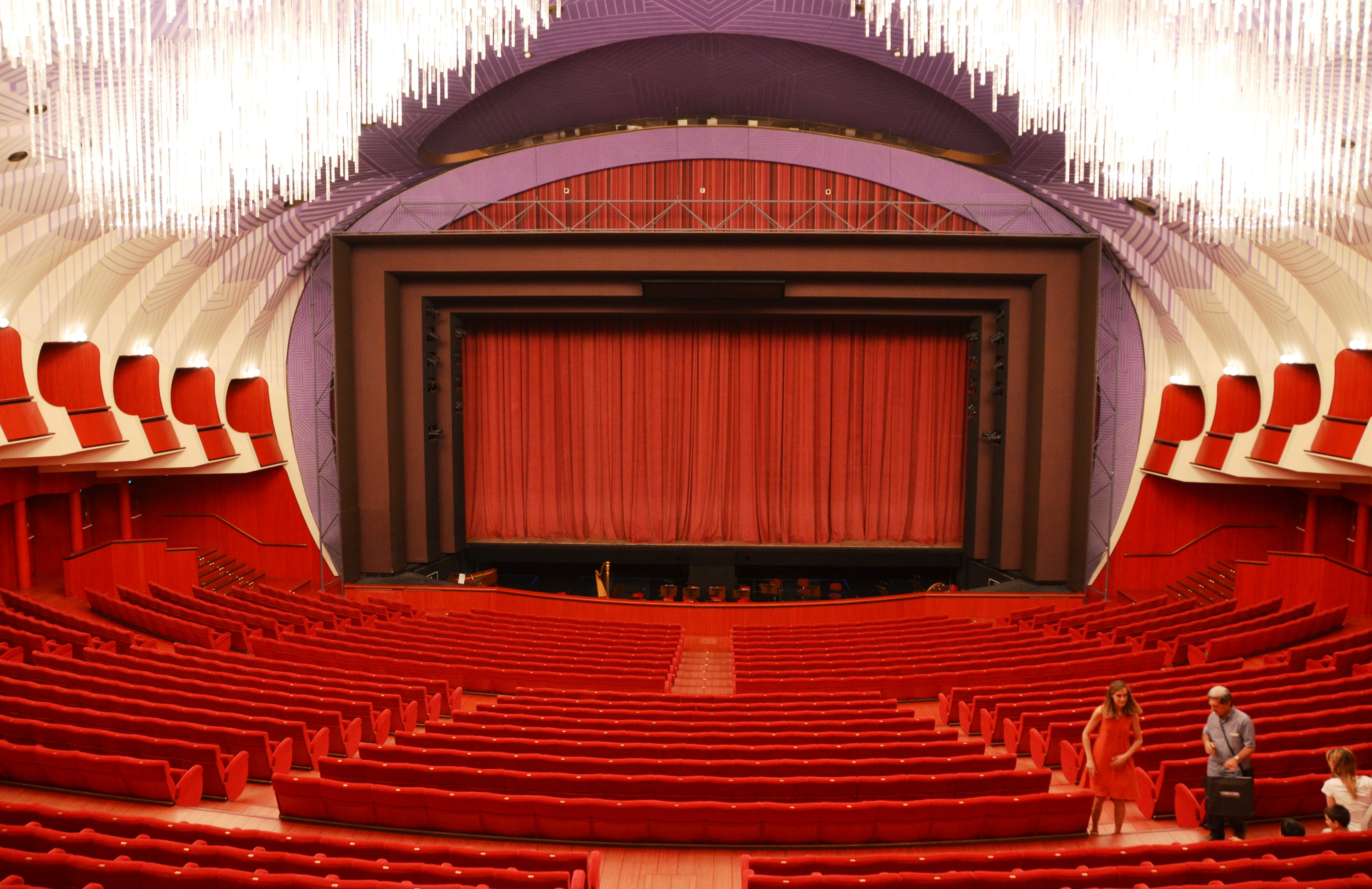 Teatro Regio de Torí - Interior